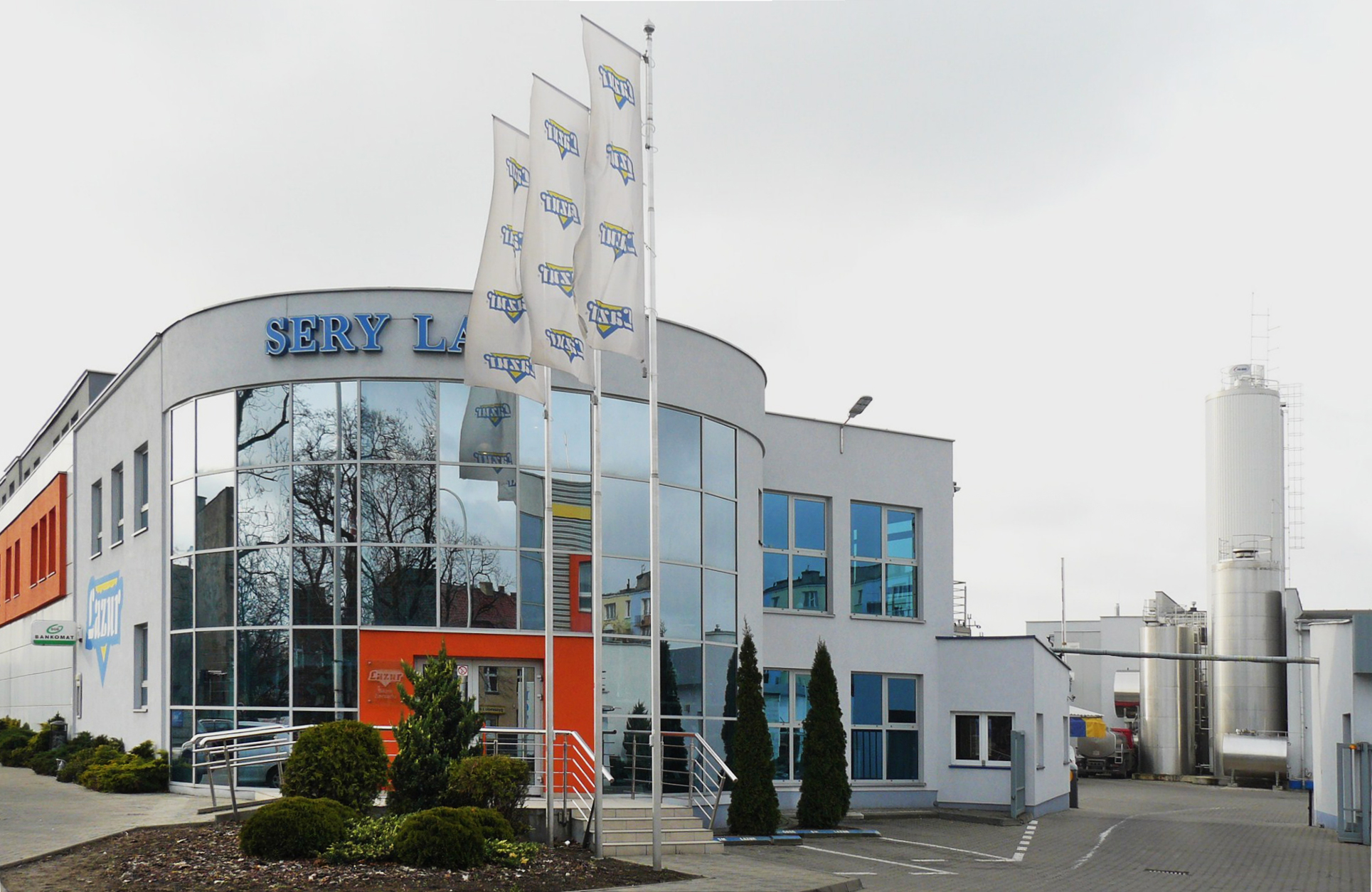 Nw. Skalmierzyce - fabryka sera Lazur.